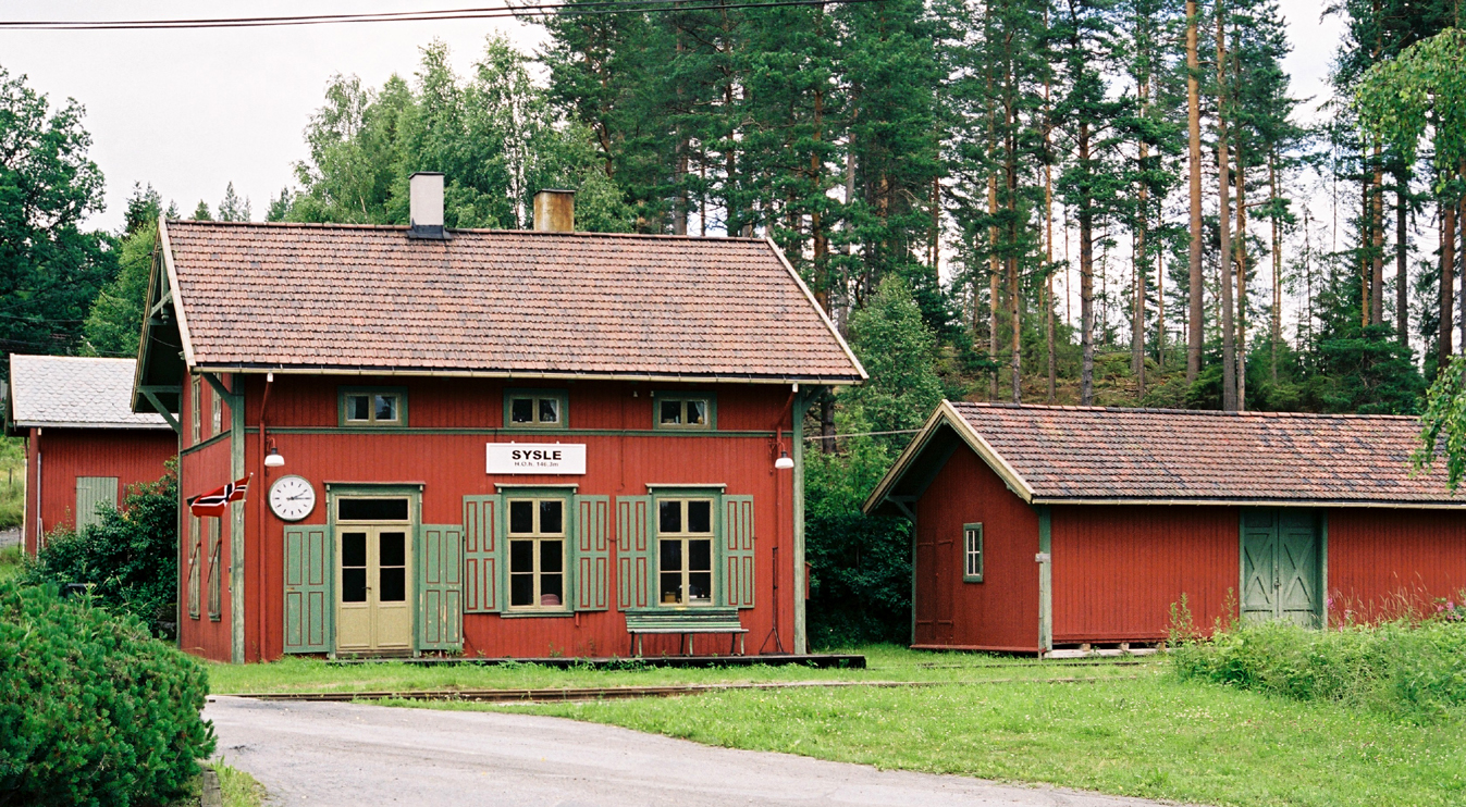 Sysle stasjon, Krøderbanen. Trolig bygd 1893.